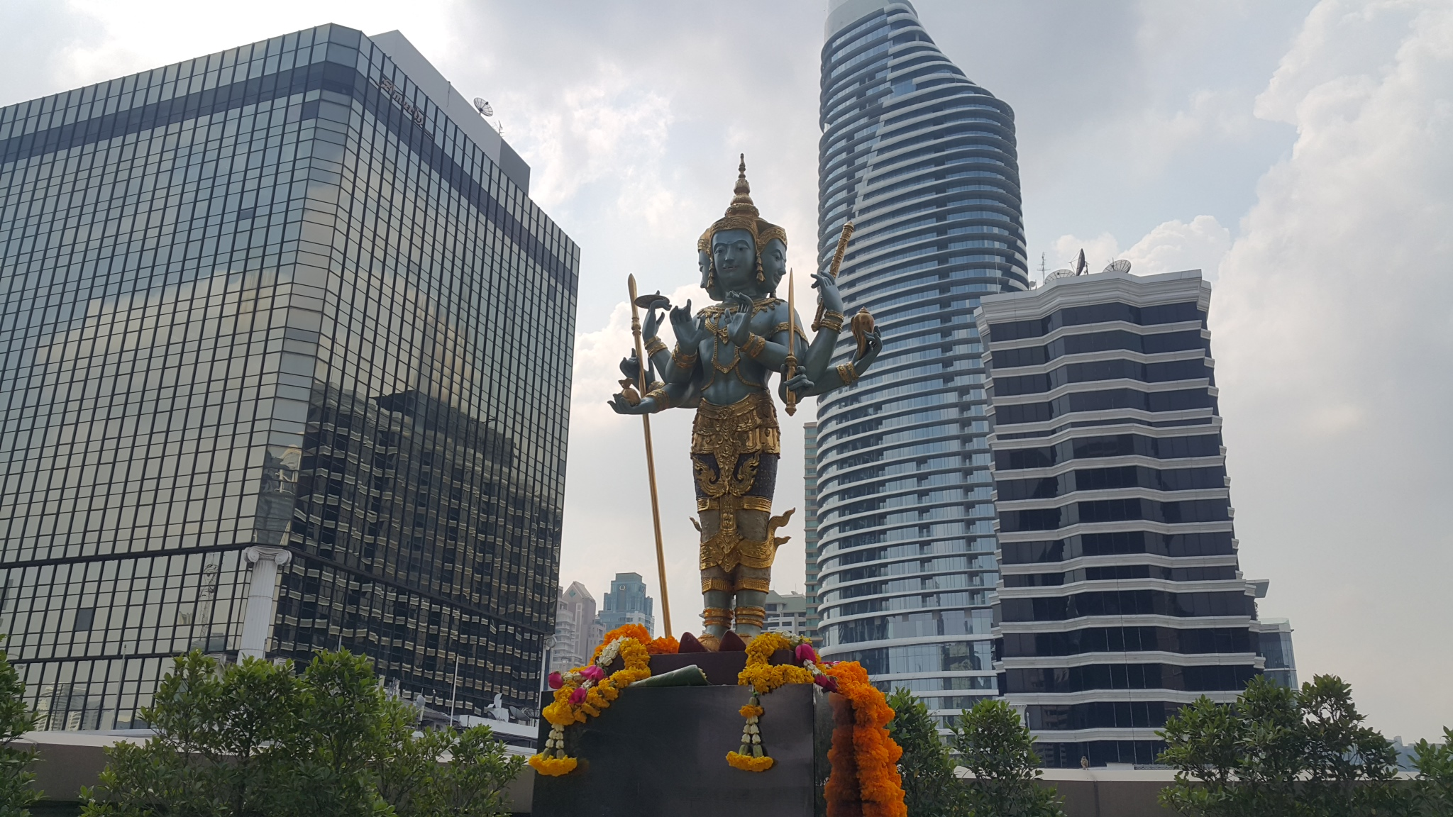 ศาลท้าวจตุโลกบาล เกษรวิลเลจ กรุงเทพมหานคร